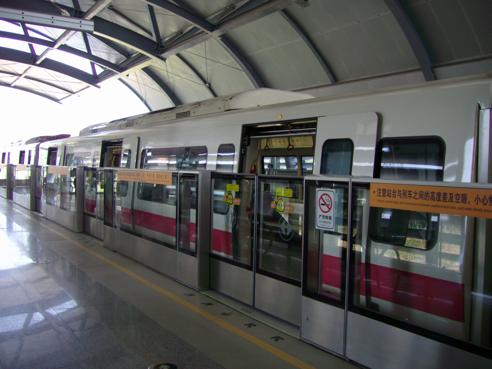 广州地铁四号线的列车和屏蔽门